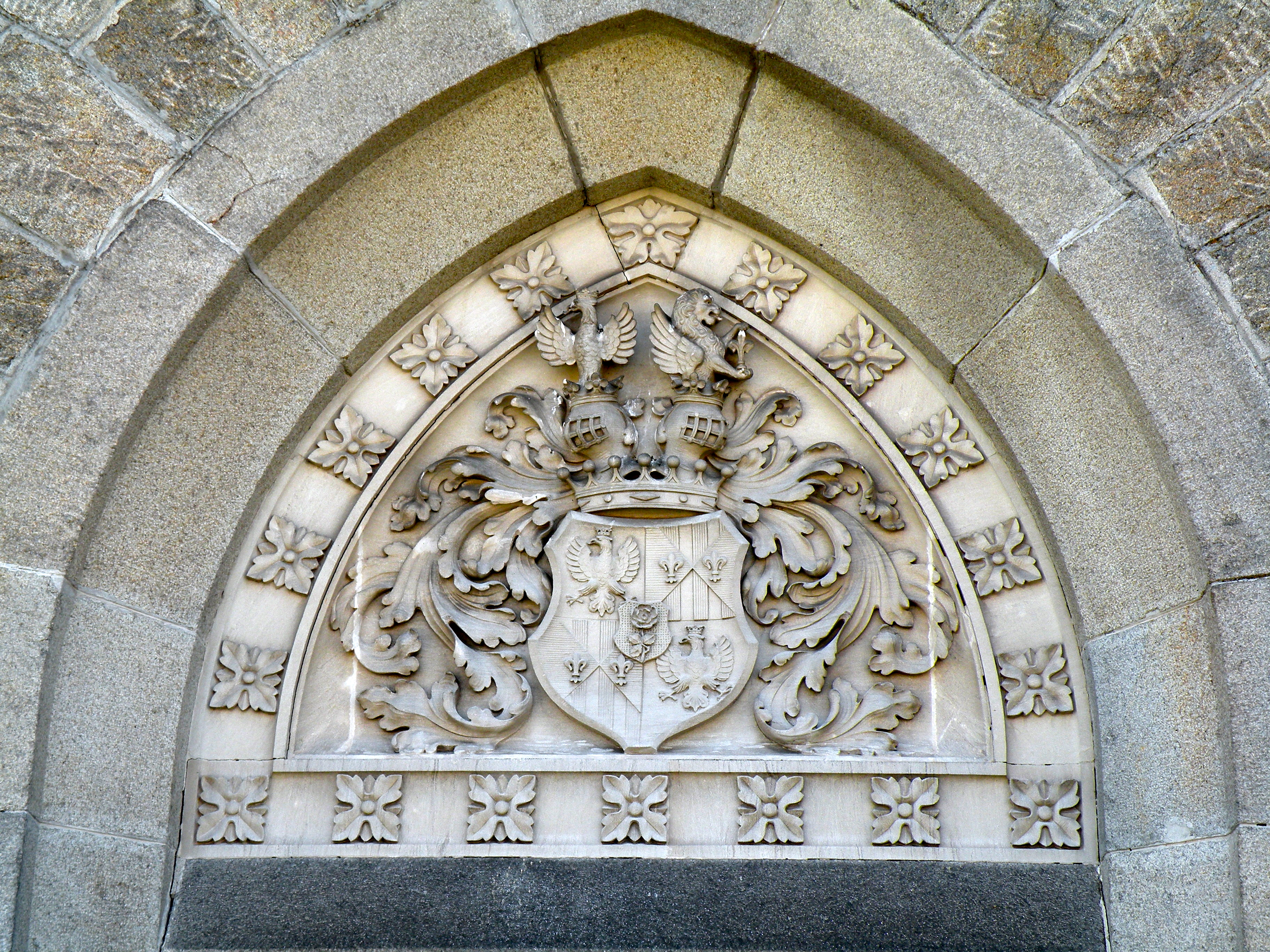 Relief des Tinti´schen Familienwappens über dem Portal der Gruftkapelle der Freiherrn von Tinti auf der Westseite des Friedhofs der Pfarre Münzbach . Das Relief stammt aus der Zeit der Erbauung der neugotischen Kapelle im Jahr 1906. Die Gruftkapelle gehörte ursprünglich zum Schloss Innernstein